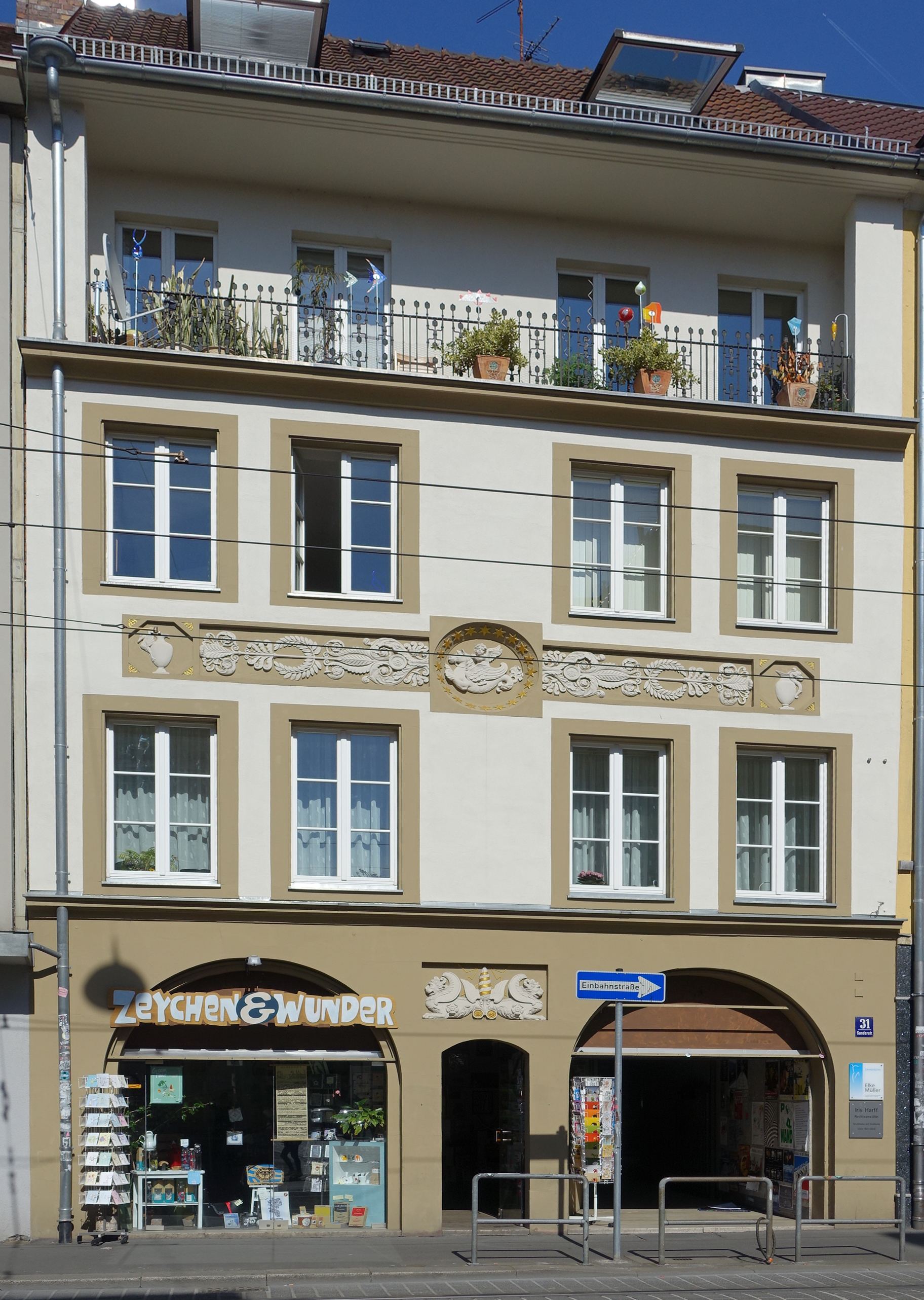 Wohnhaus